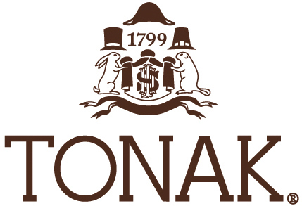 znak